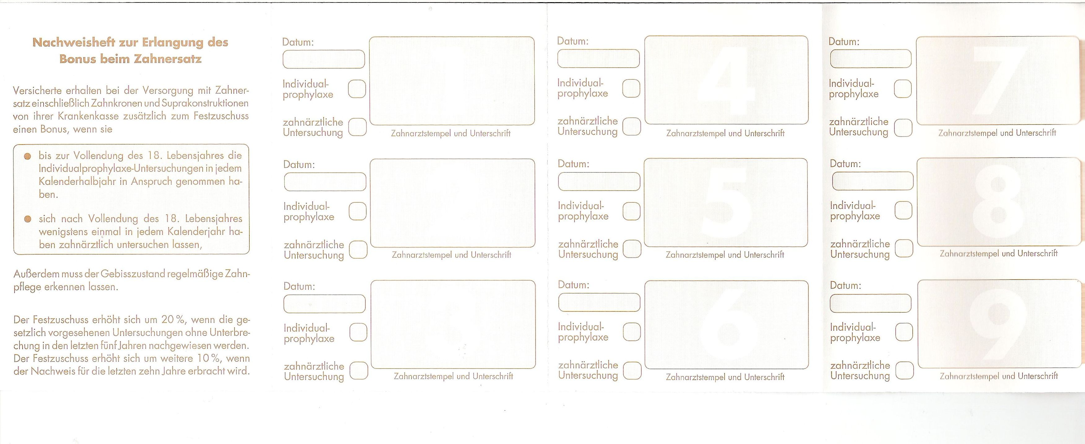 Bonusheft, Zahnersatz, Zahnarzt, Krankenkasse